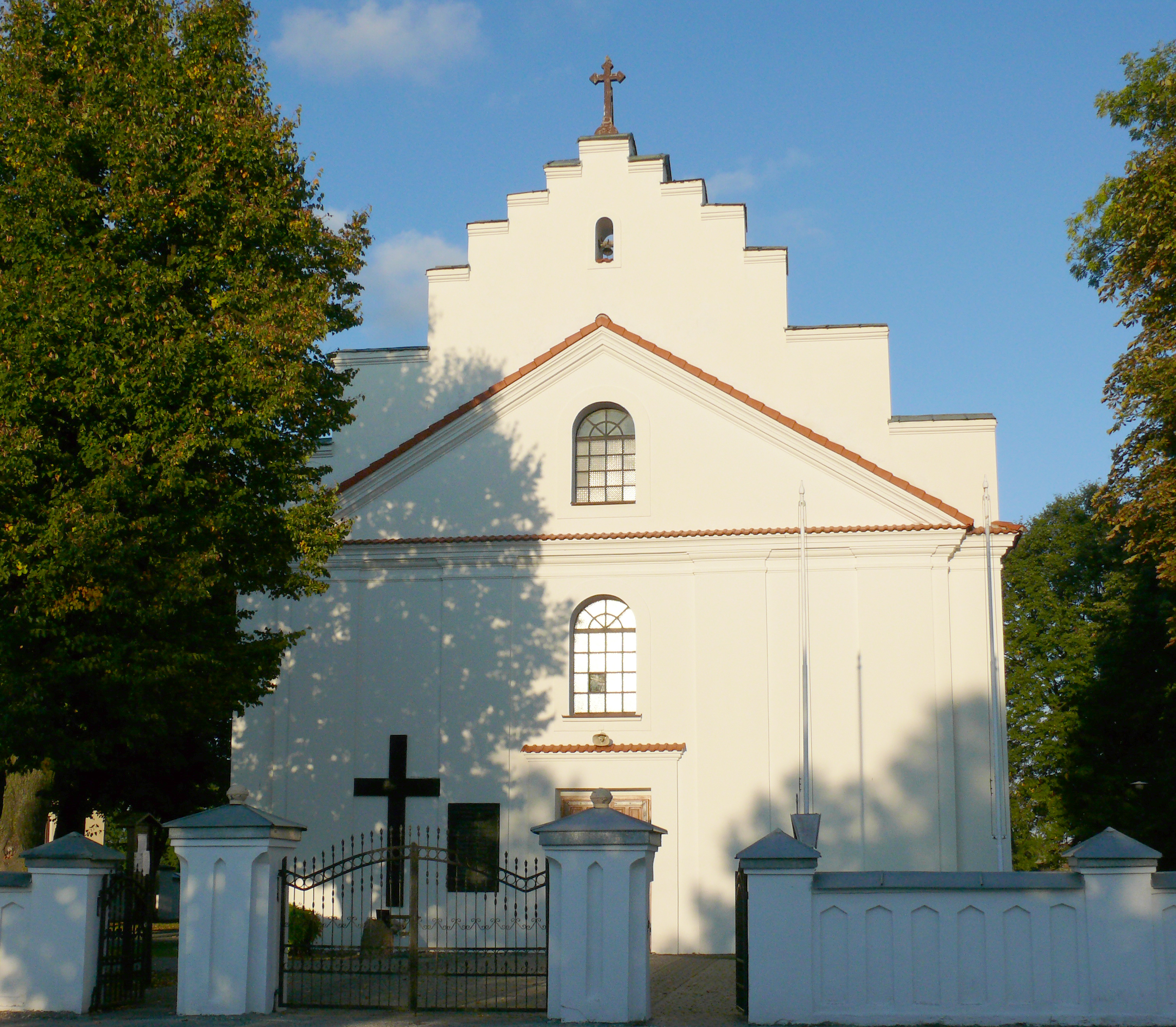 Kościół parafii pod wezwaniem Niepokalanego Poczęcia Najświętszej Marii Panny (1835r.) w miejscowości gminnej Drelów, powiat bialski, woj. lubelskie. Widok od frontu. (Zabytek nr. A-264 z 20.08.1997)